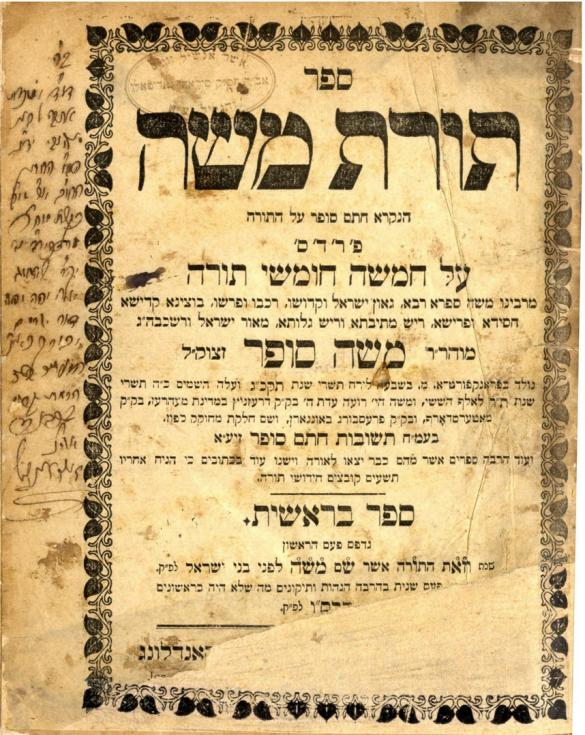 תורת משה. חתם סופר על התורה. וינה, תרס"ו [1906]. הקדשה וחתימת רבי אשר אנשיל וייס רבה של [סילאדי] נאדי פאלו. בעמוד השער חותמת הרב אשר אנשיל וייס, והקדשה בכתב ידו וחתימתו שנתן את הספר כמתנת נישואין. הרב אשר אנשיל וייס [תרמ"ב – תש"ד 1882- 1944] היה תלמידו של רבי שמואל בנימין סופר, כיהן כרב של [סילאדי] נאדי פאלו, הונגריה. נהרג בשואה, דברי תורה ממנו נדפסו בספרו שמן למנחה על סוגיות הש"ס [ירושלים, תשכ"ט].